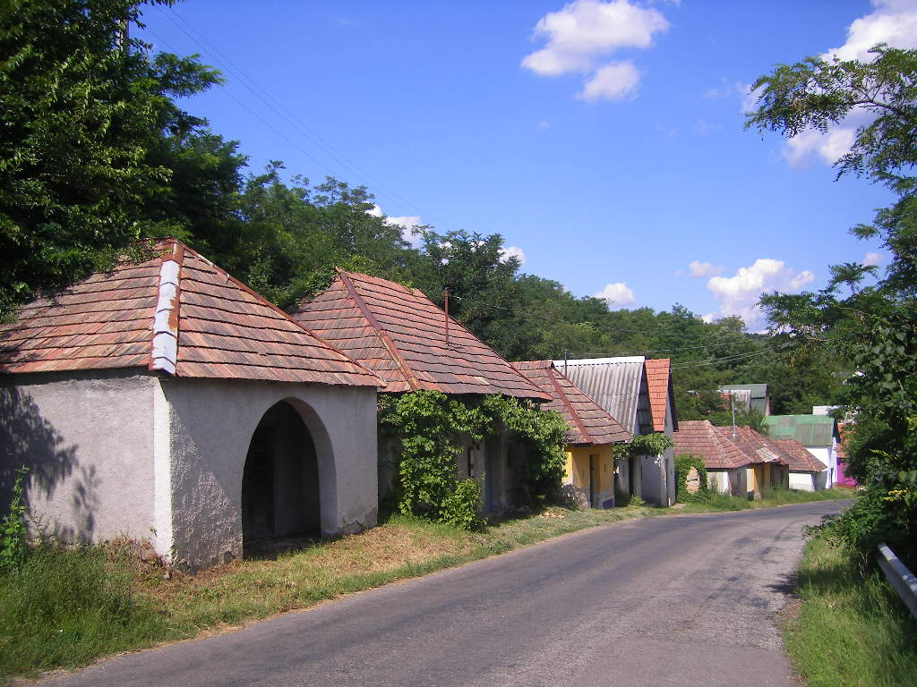 Perőcsény - Kossuth utca (pincesor)